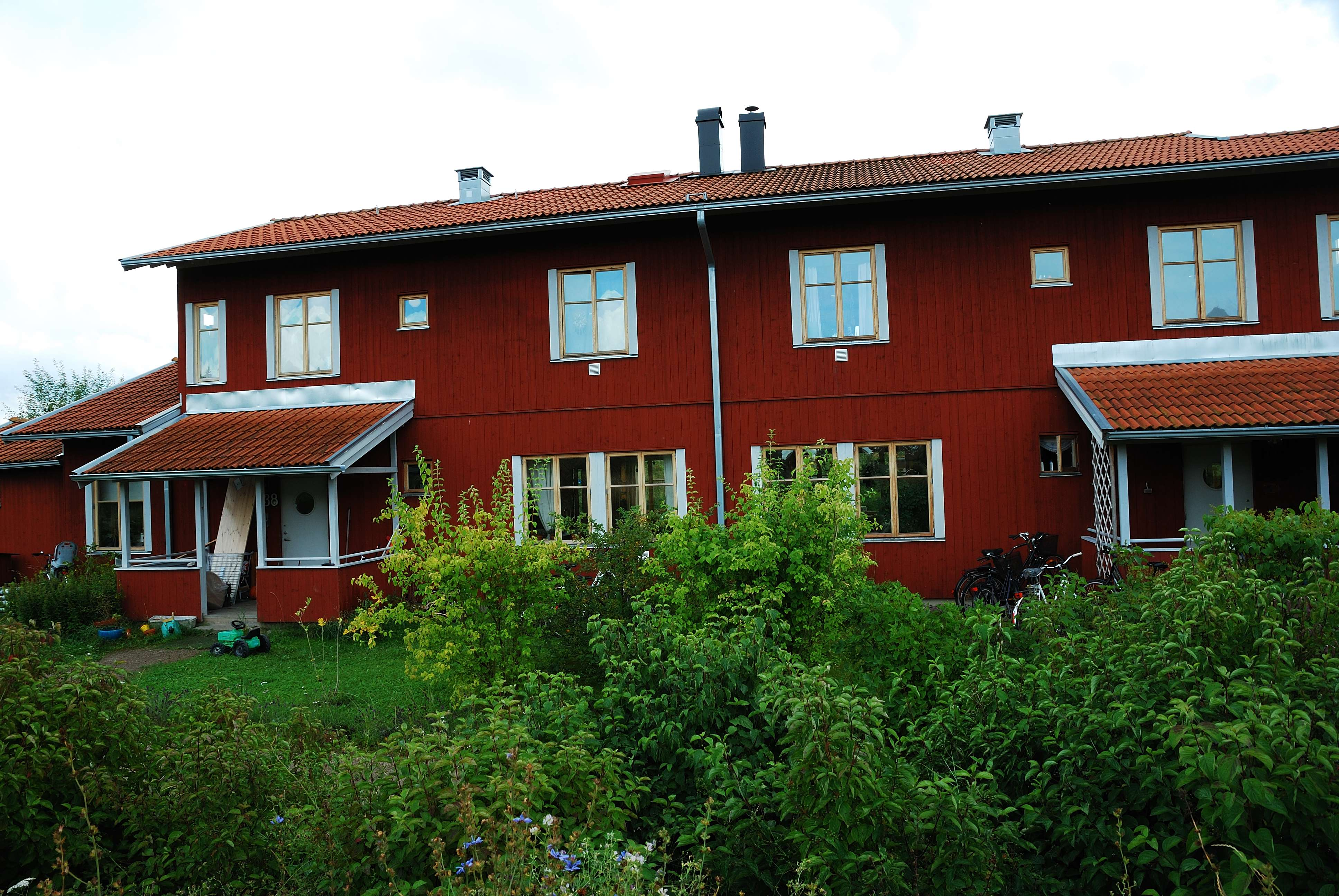 Bostadshus i Håga, Uppsala.